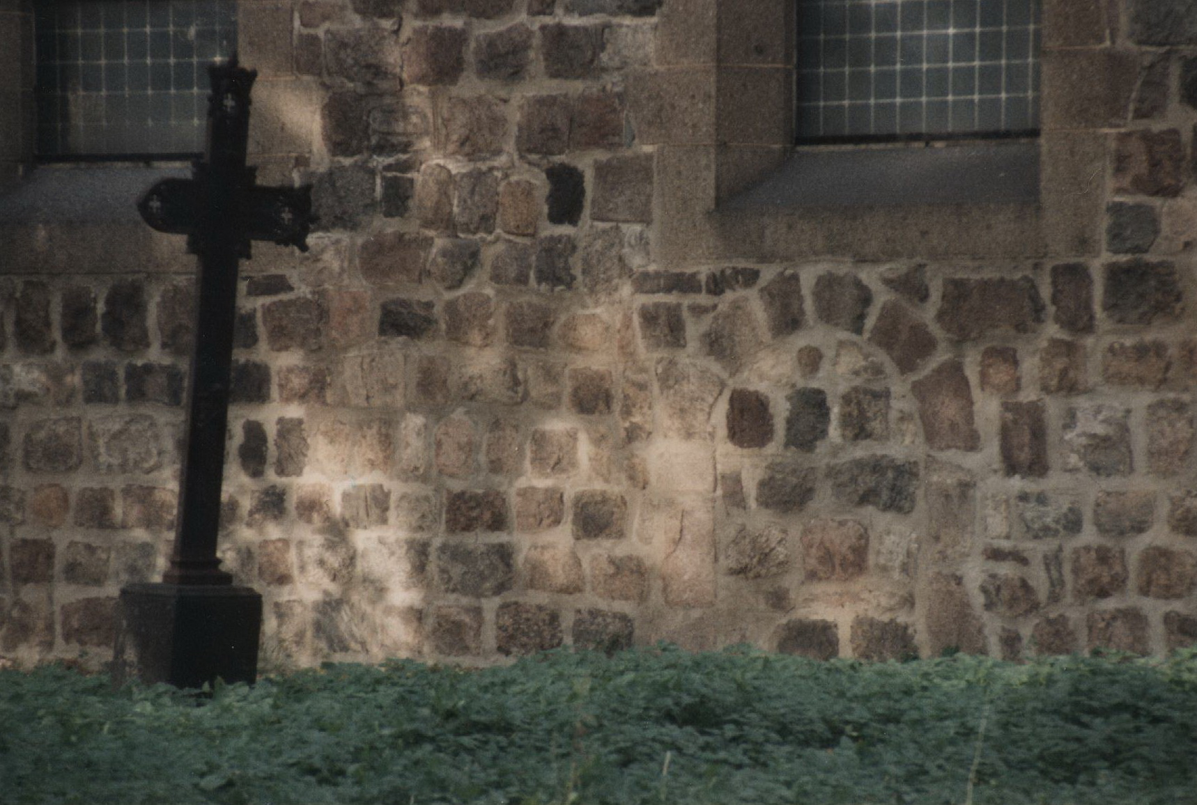 In der Südwand der Dorfkirche Berlin-Rosenthal ist ein zugesetztes Rundbogenportal zu erkennen. Das Rundbogenportal und die sorgfältig gequaderten Feldsteine erweisen die Dorfkirche als einen ursprünglichen spätromanischen Bau (um 1250).